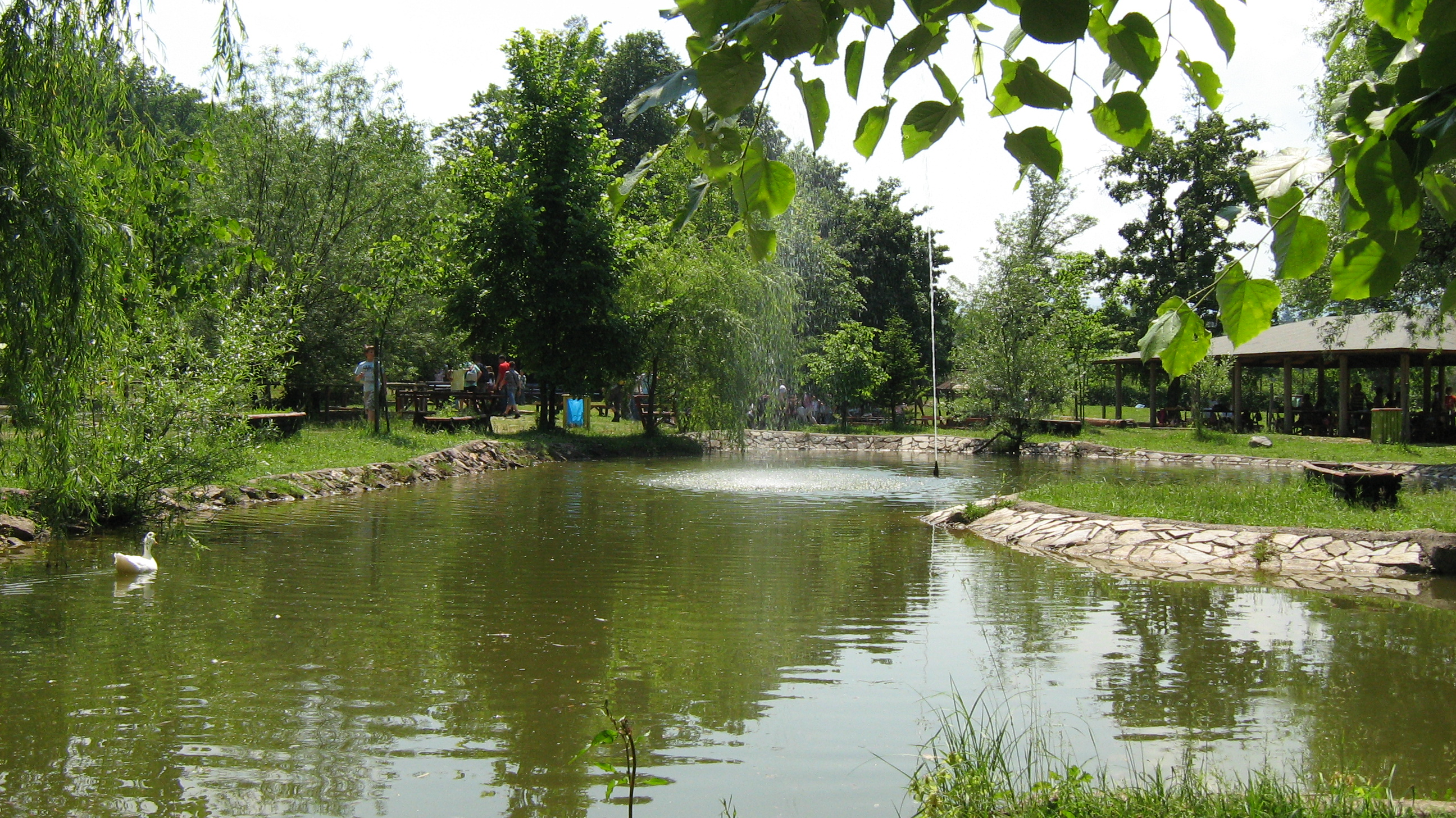 Бањалучки зоолошки врт.